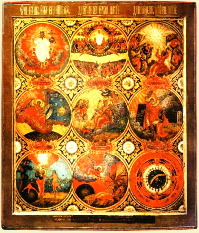 Икона Отче наш. Павлово-на-Оке. Василий Р. (Василий Рассадин ?). 1813 год. Дерево, левкас, темпера. Размер - 72,1 х 62,8 см.